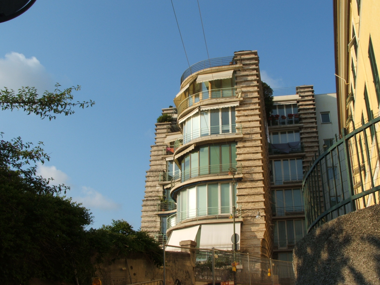 Genova, quartiere di Albaro